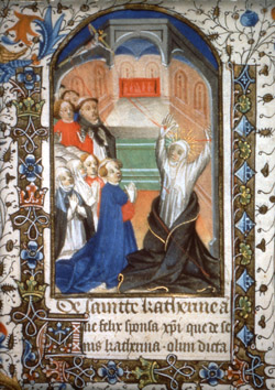 Henry D’Orquelaulz, attr., Caterina riceve le stimmate, in Libro d’Ore secondo l’uso di Metz, (1440 ca.), Parigi Biblioteca Nazionale, ms. lat. 10533